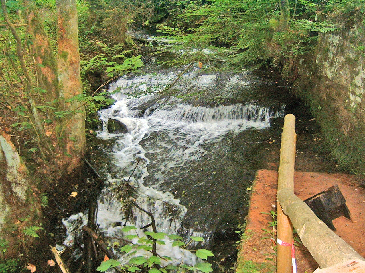 Moosalbe im Naturschutzgebiet „Karlstalschlucht“